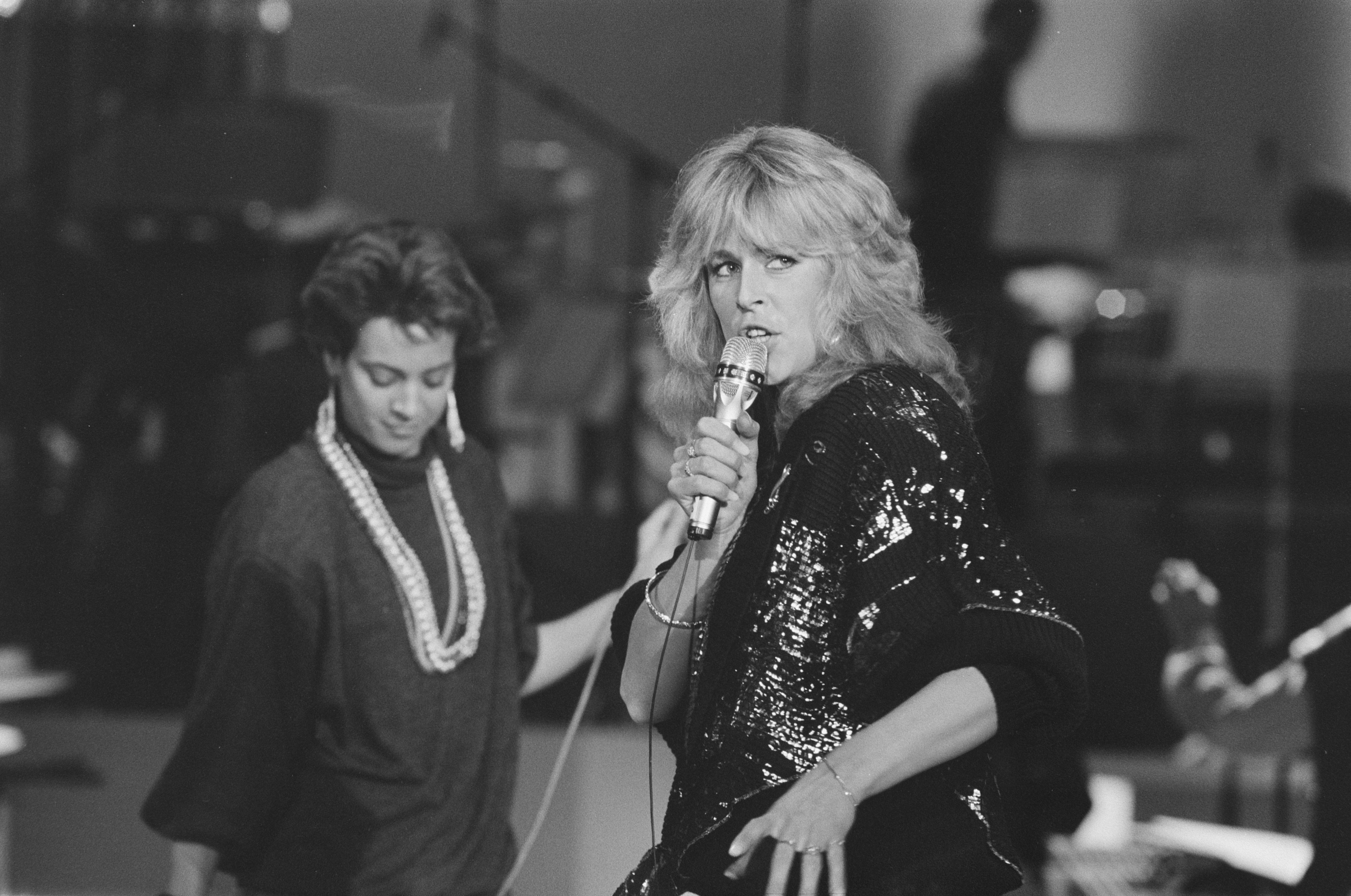 Collectie / Archief : Fotocollectie Anefo Reportage / Serie : [ onbekend ] Beschrijving : Zangeres Marcha ( Marga Bult ) tijdens repetitie Nationaal Songfestival Datum : 24 maart 1987 Trefwoorden : repetities, songfestivals, zangeressen Instellingsnaam : Nationaal Songfestival Fotograaf : Bogaerts, Rob / Anefo Auteursrechthebbende : Nationaal Archief Materiaalsoort : Negatief (zwart/wit) Nummer archiefinventaris : bekijk toegang 2.24.01.05 Bestanddeelnummer : 933-9325